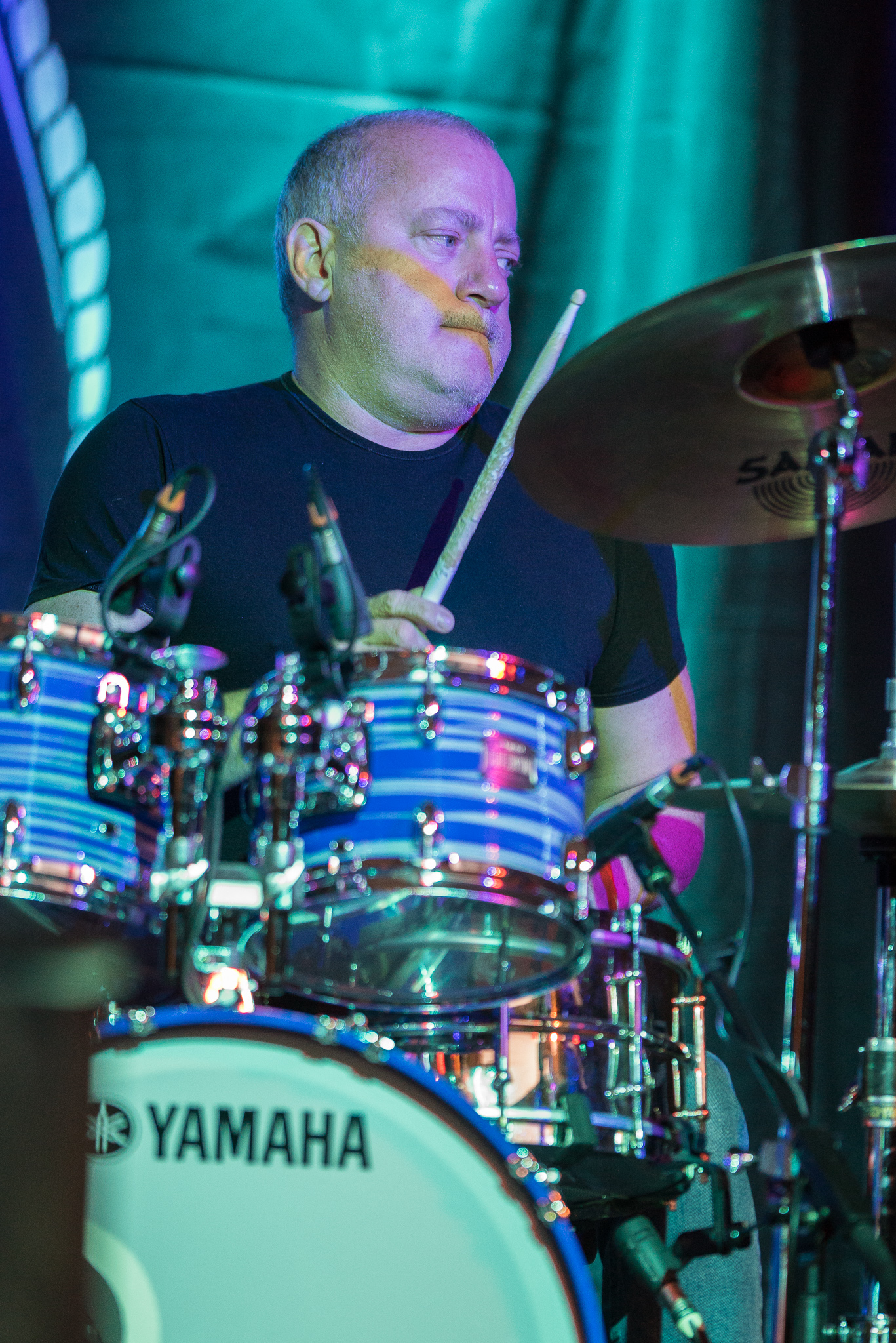 Concertbüro Franken,Geoff Dunn,Konzert,Livekonzert,Livemusik,Musik,Procol Harum,Serenadenhof